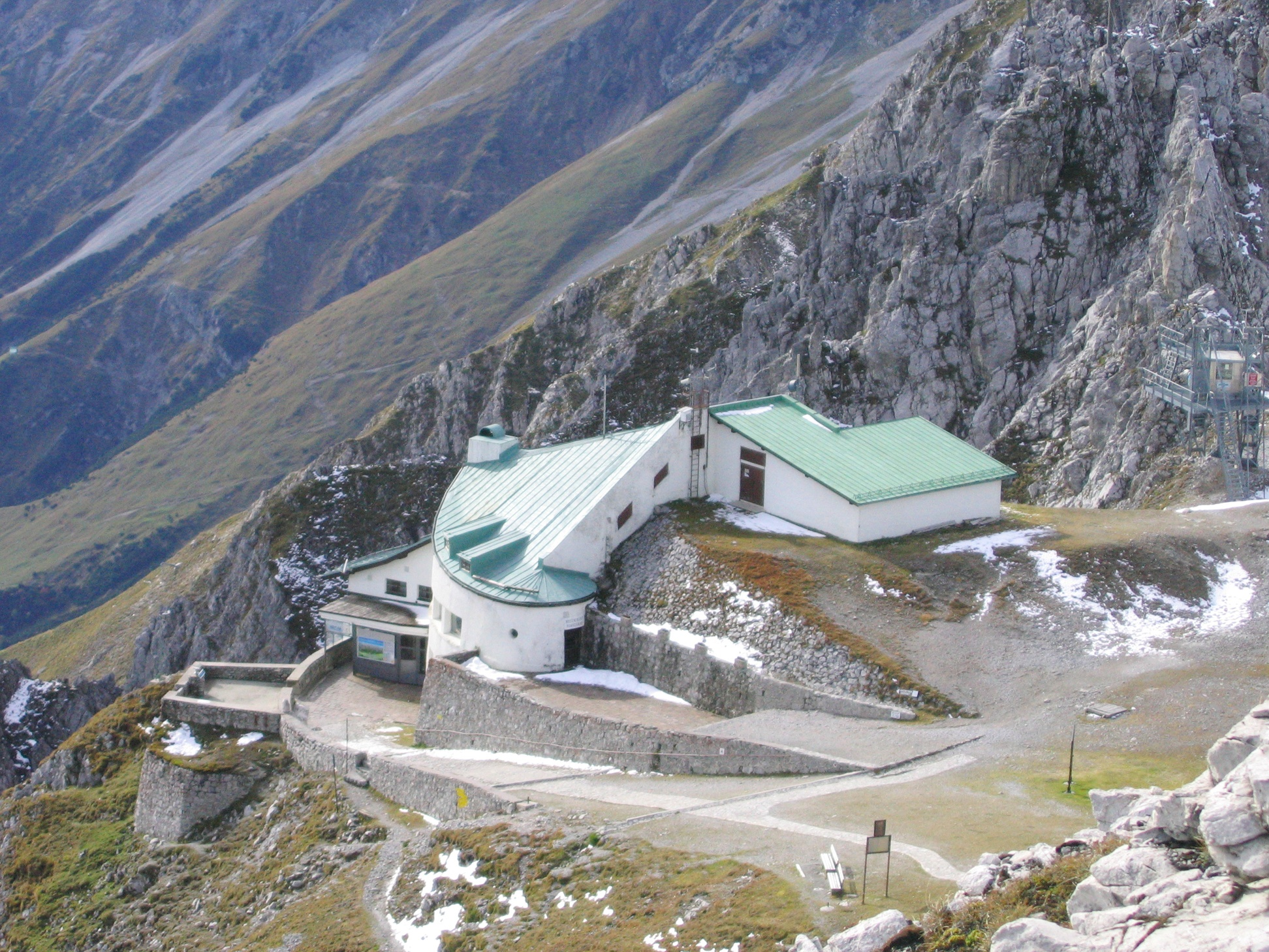 Upper station of the Nordkettenbahn/Bergstation der Nordkettenbahn/Stazione a monte della Nordkettenbahn